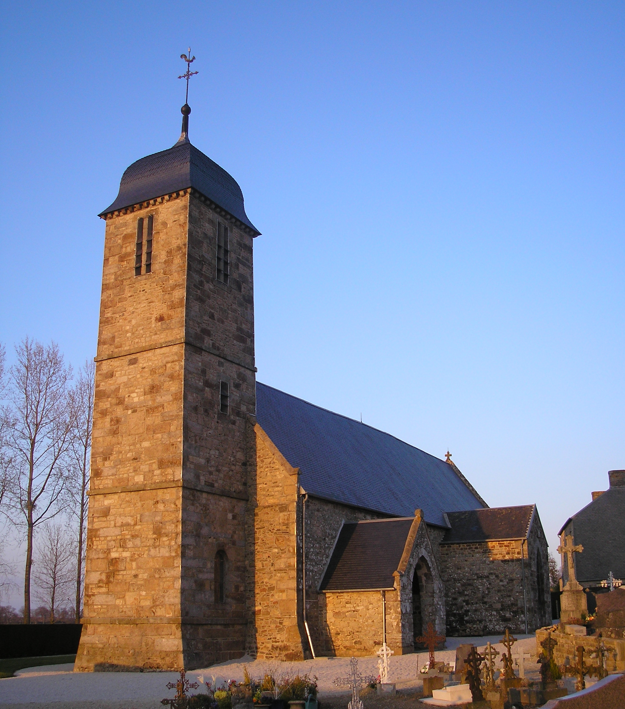 Roullours (Normandie, France). L'église Saint-Martin.